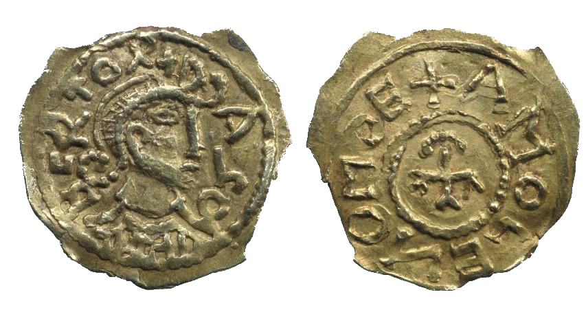 Tiers de sou d'or de Dagobert II (674-678). Avers : Buste diadémé à droite. Revers : Croix auréolée et chrismée, dans un grènetis.